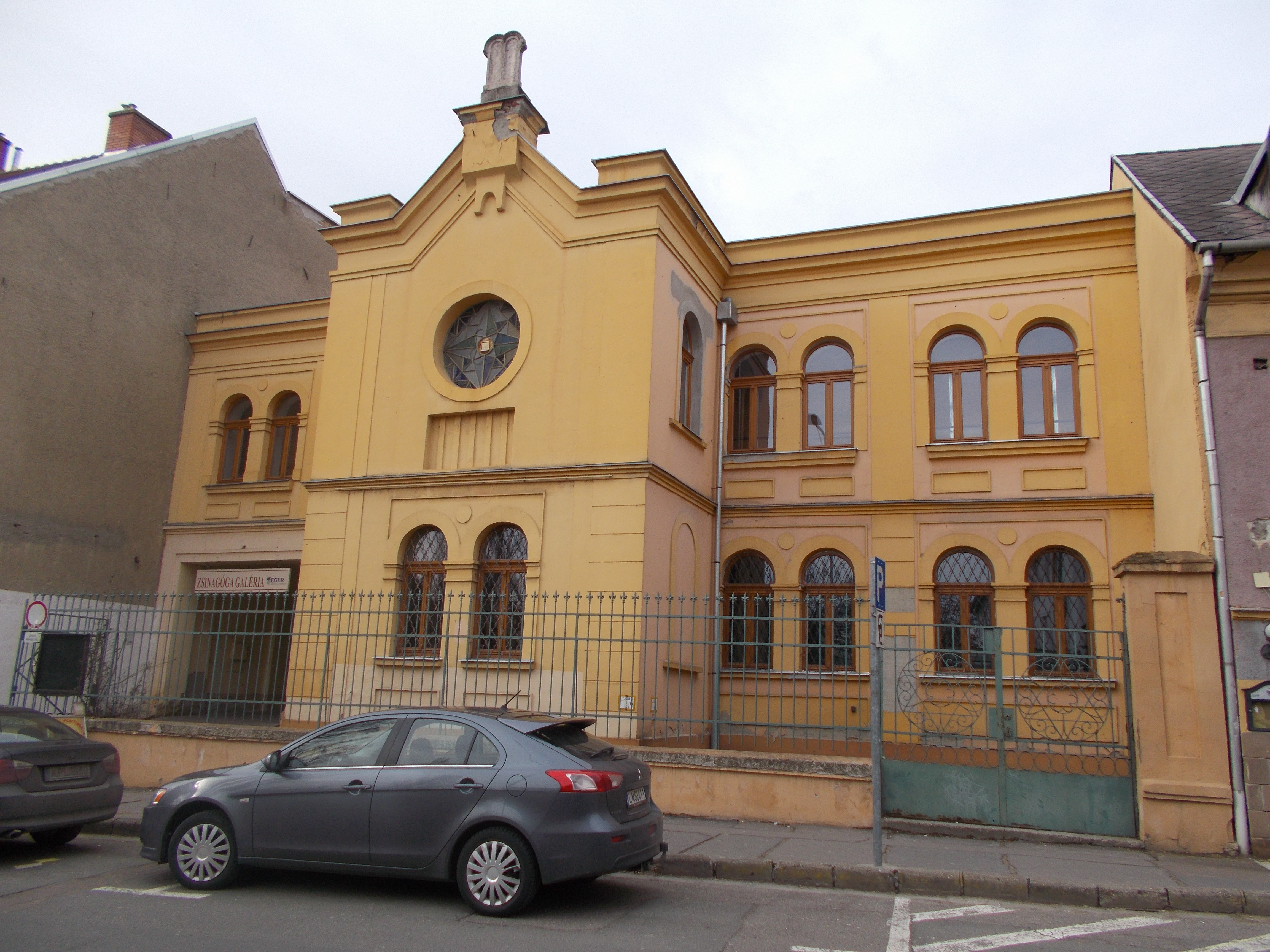 Zsinagóga Galéria, Eger